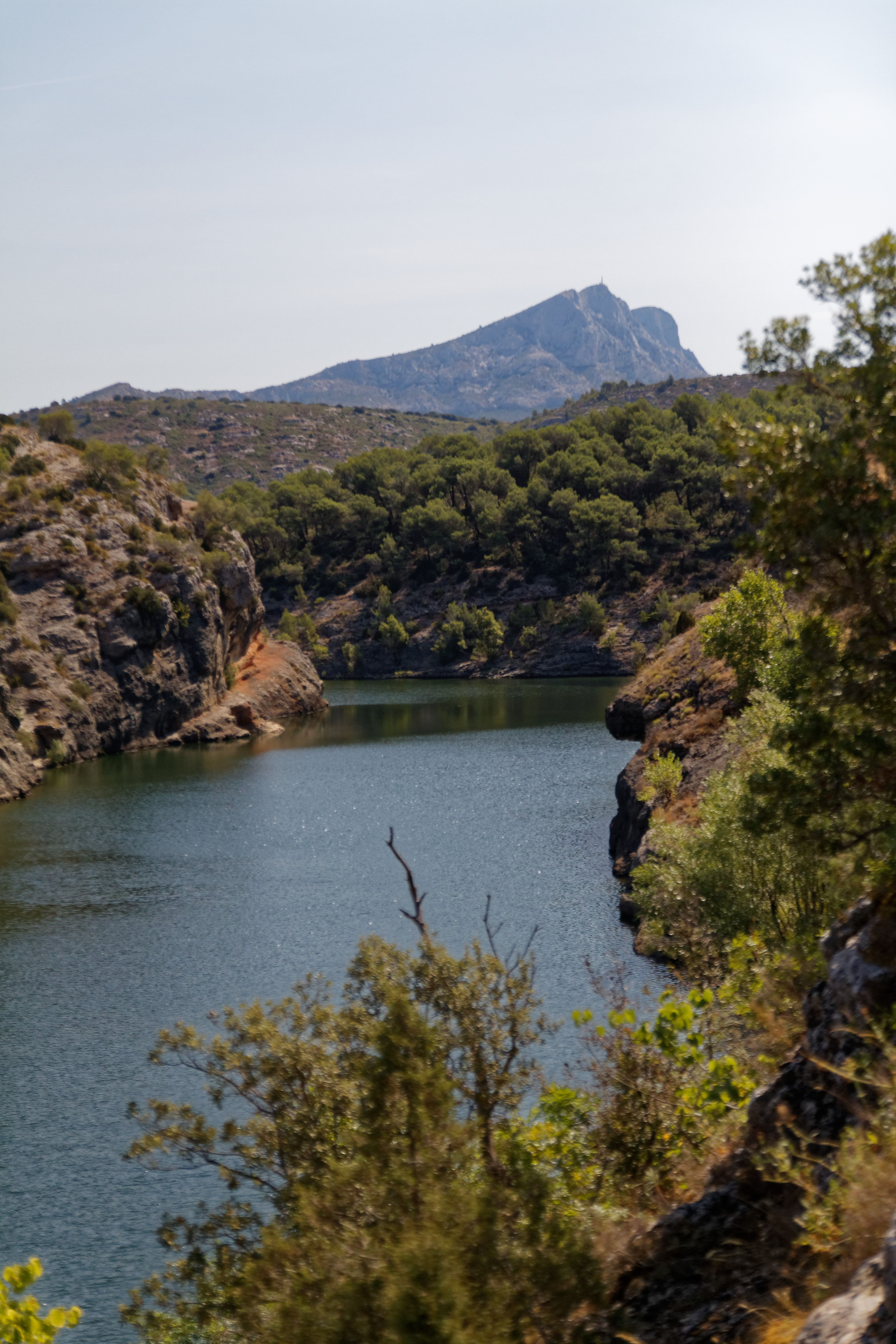 Zola-Talsperre in Le Tholonet mit der Montagne Sainte-Victoire im Hintergrund